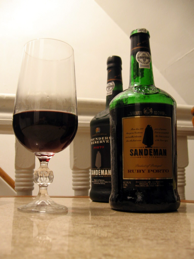 Sandeman port